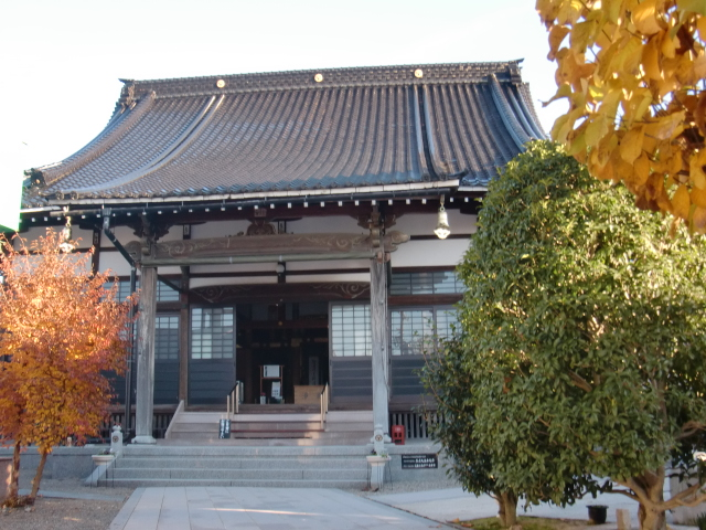 金沢市寺町 西方寺本堂